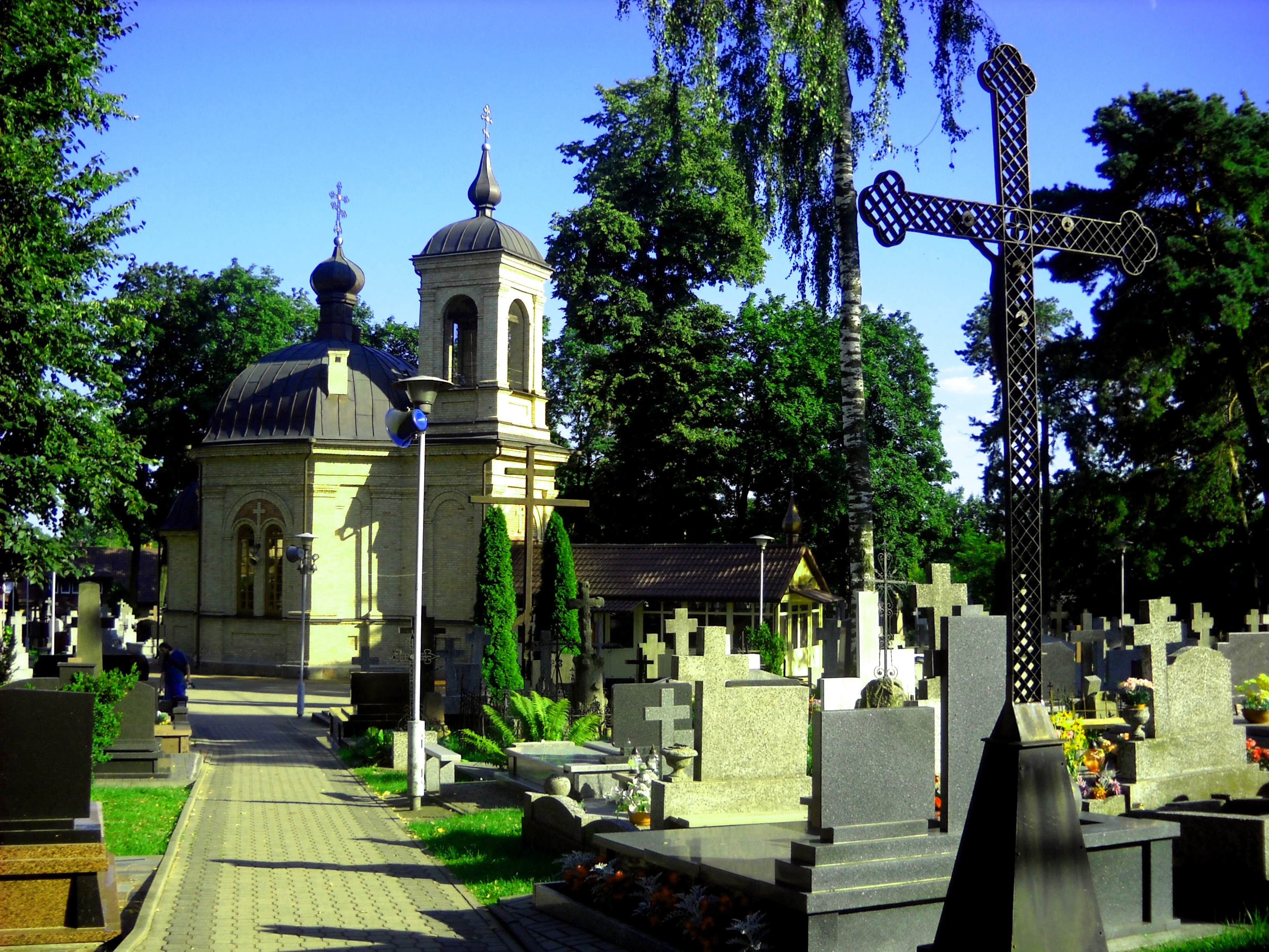 Cerkiew Wszystkich Świętych i cmentarz prawosławny w Białymstoku przy ulicy Wysockiego 1